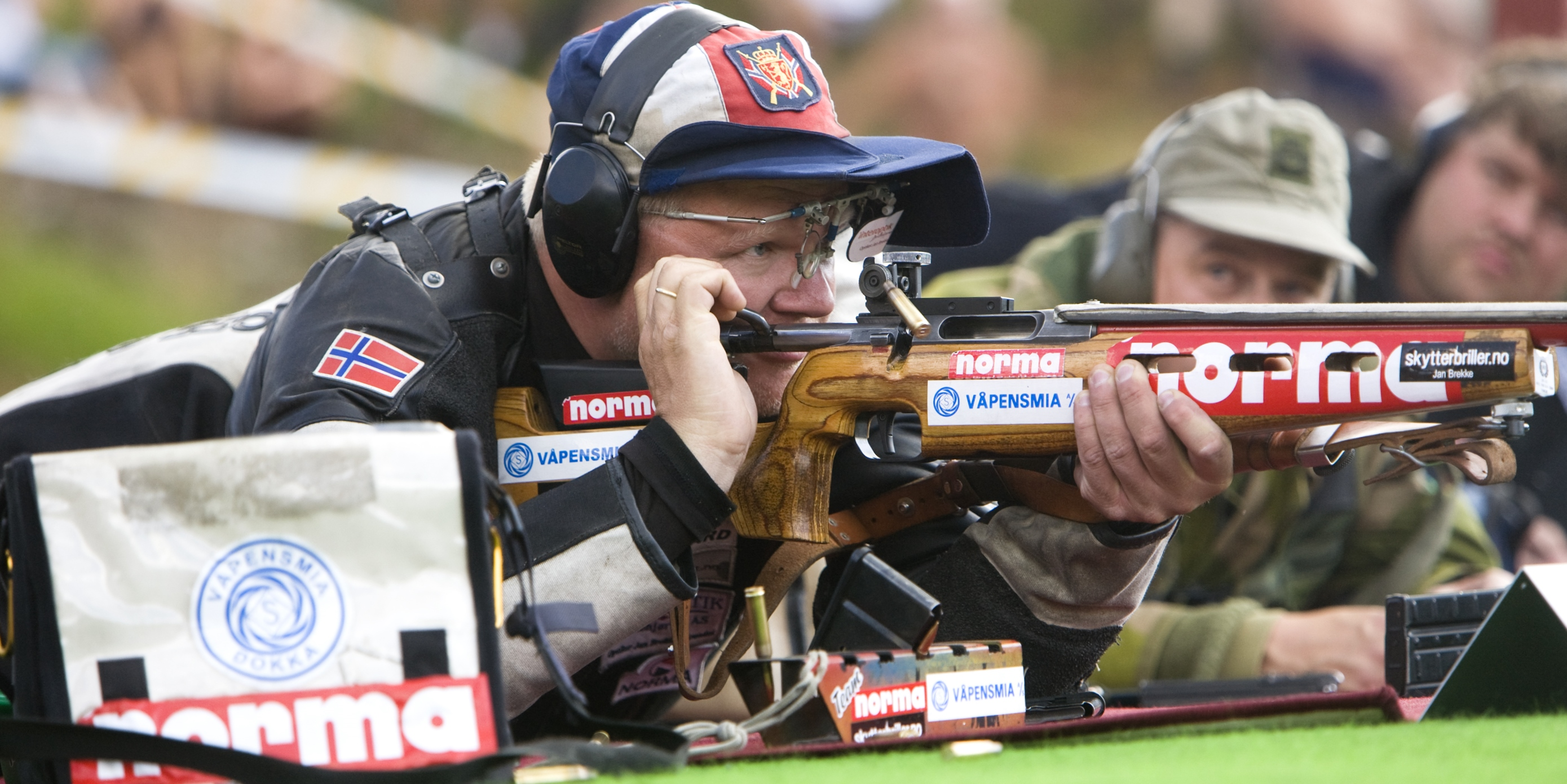 Stangvinner LS Førde 2008